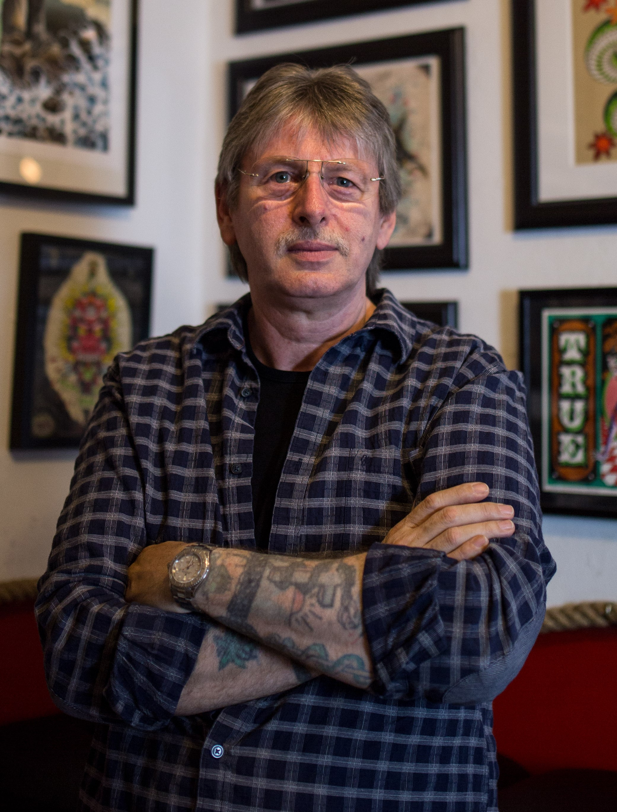 Manfred Kohrs 2016